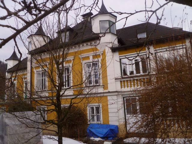 Villa_Vogelsang-Seitenansicht